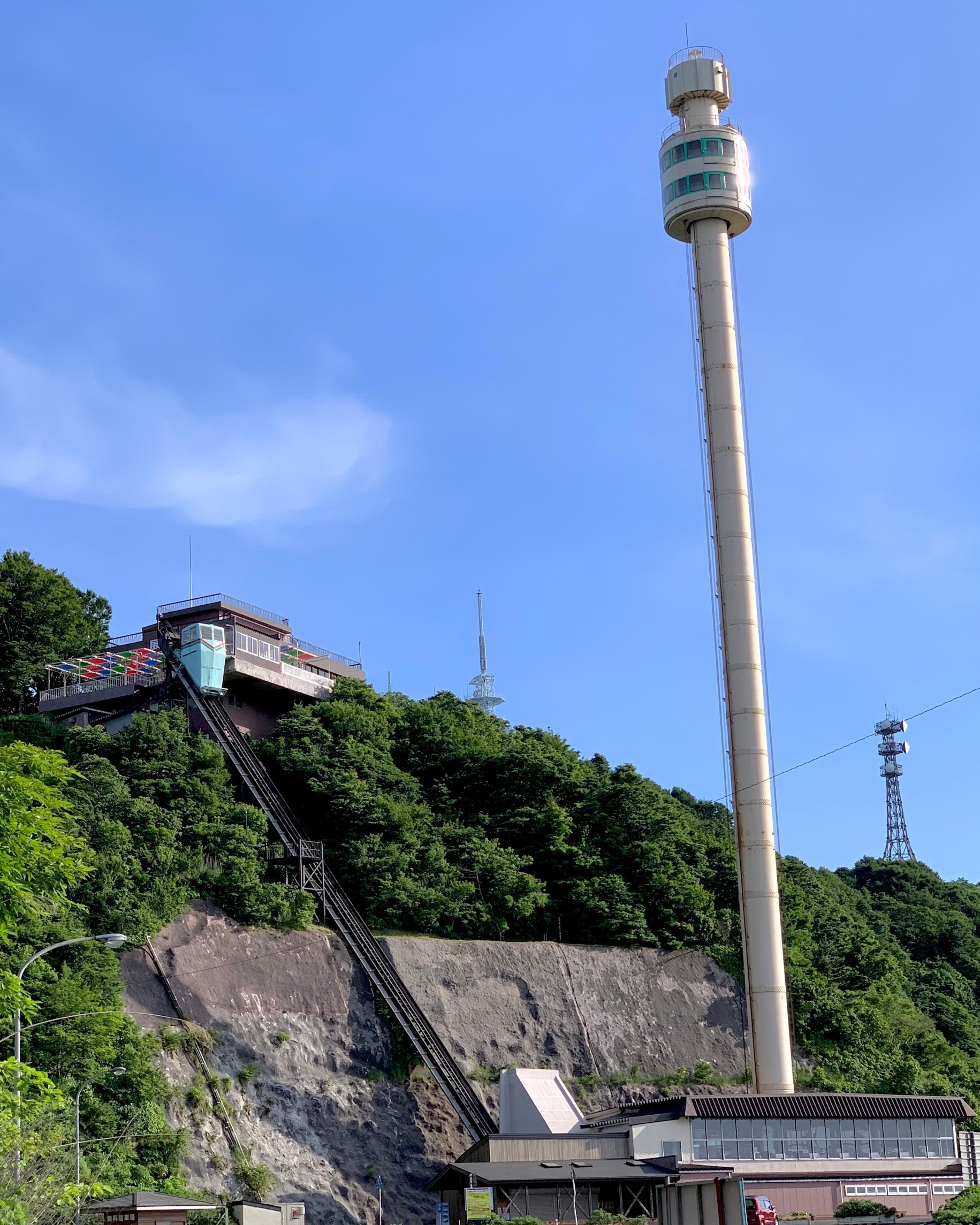 弥彦山のクライミングカー（左）とパノラマタワー（右）営業時間外に撮影（2020年6月）